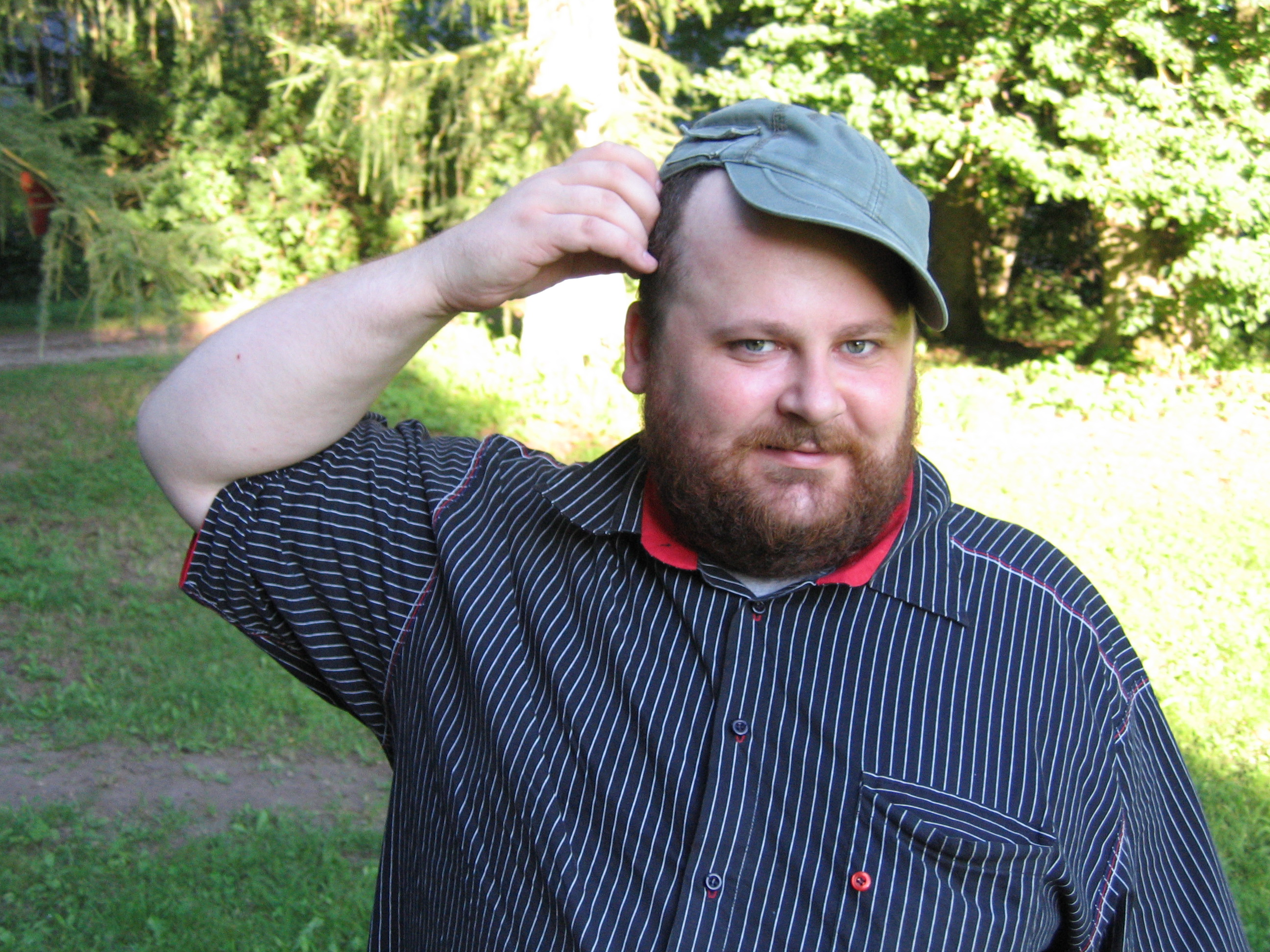 Jaan Pehk 29. juulil 2008 Raplamaal Keava mõisa ees